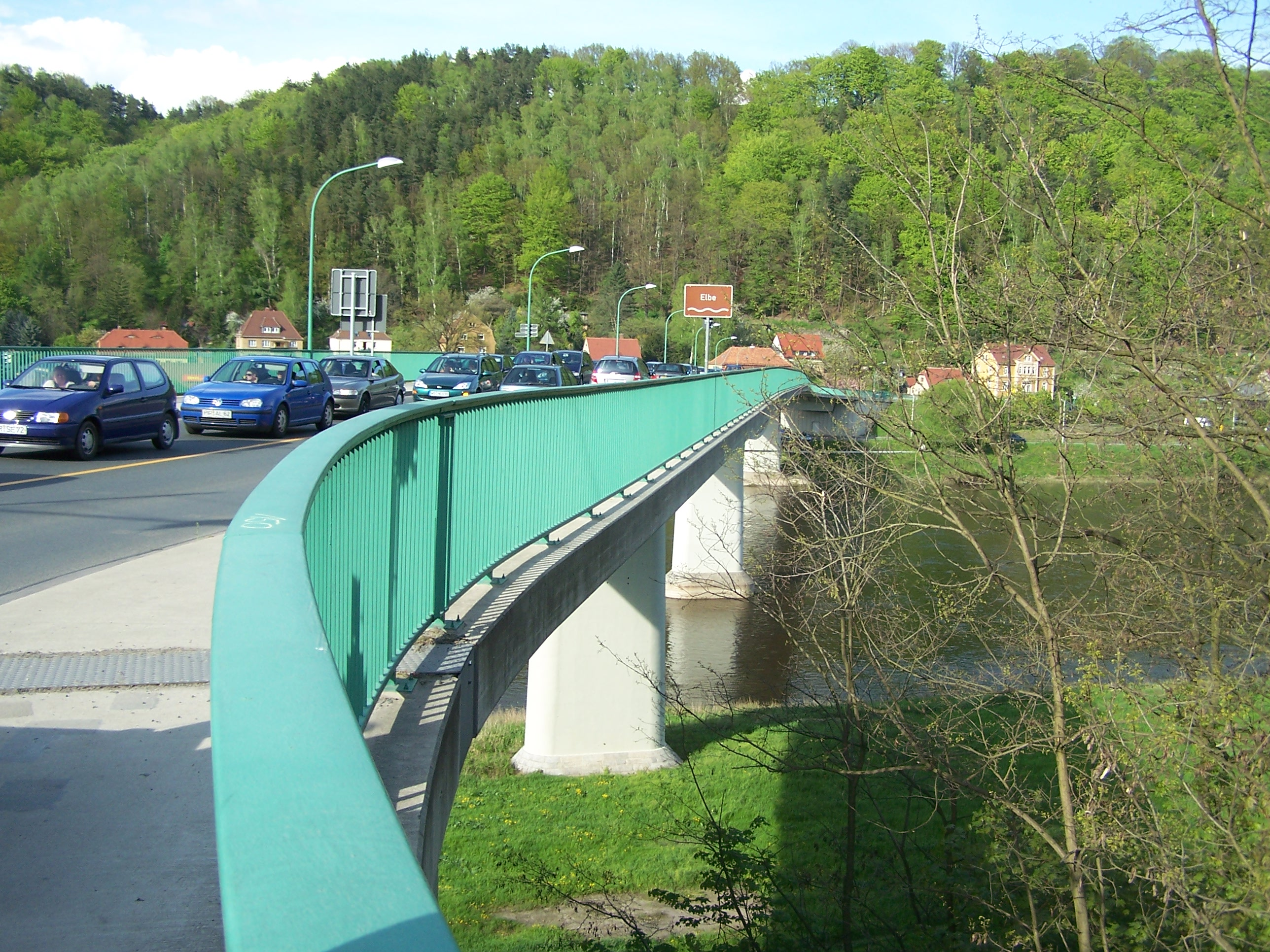 Straßenbrücke in Bad Schandau, Sächsische Schweiz